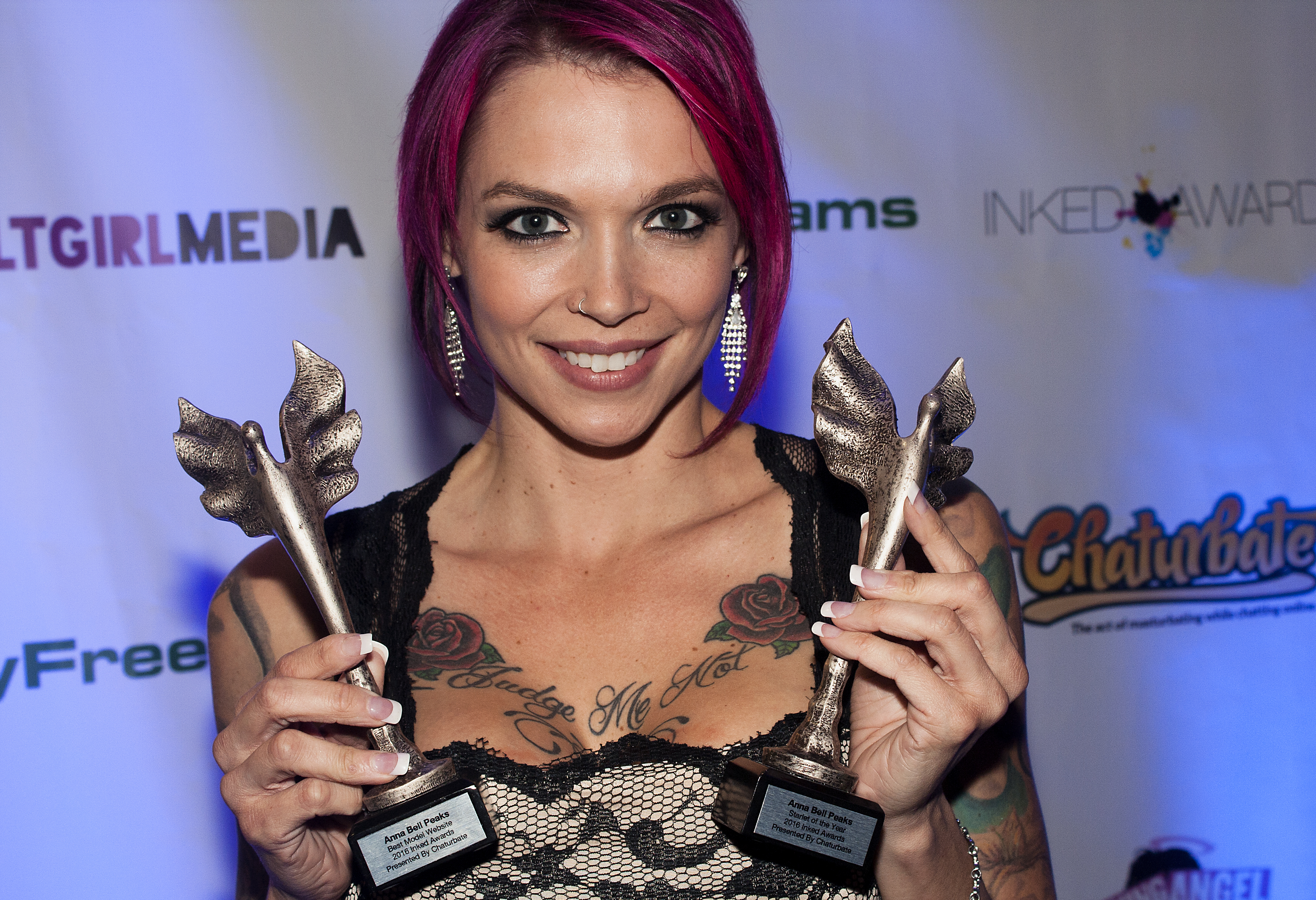 Exxxotica2016_0219bas